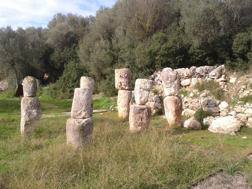 Vista lateral.